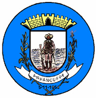 Brasão de Anhanguera, Goiás, Brasil.